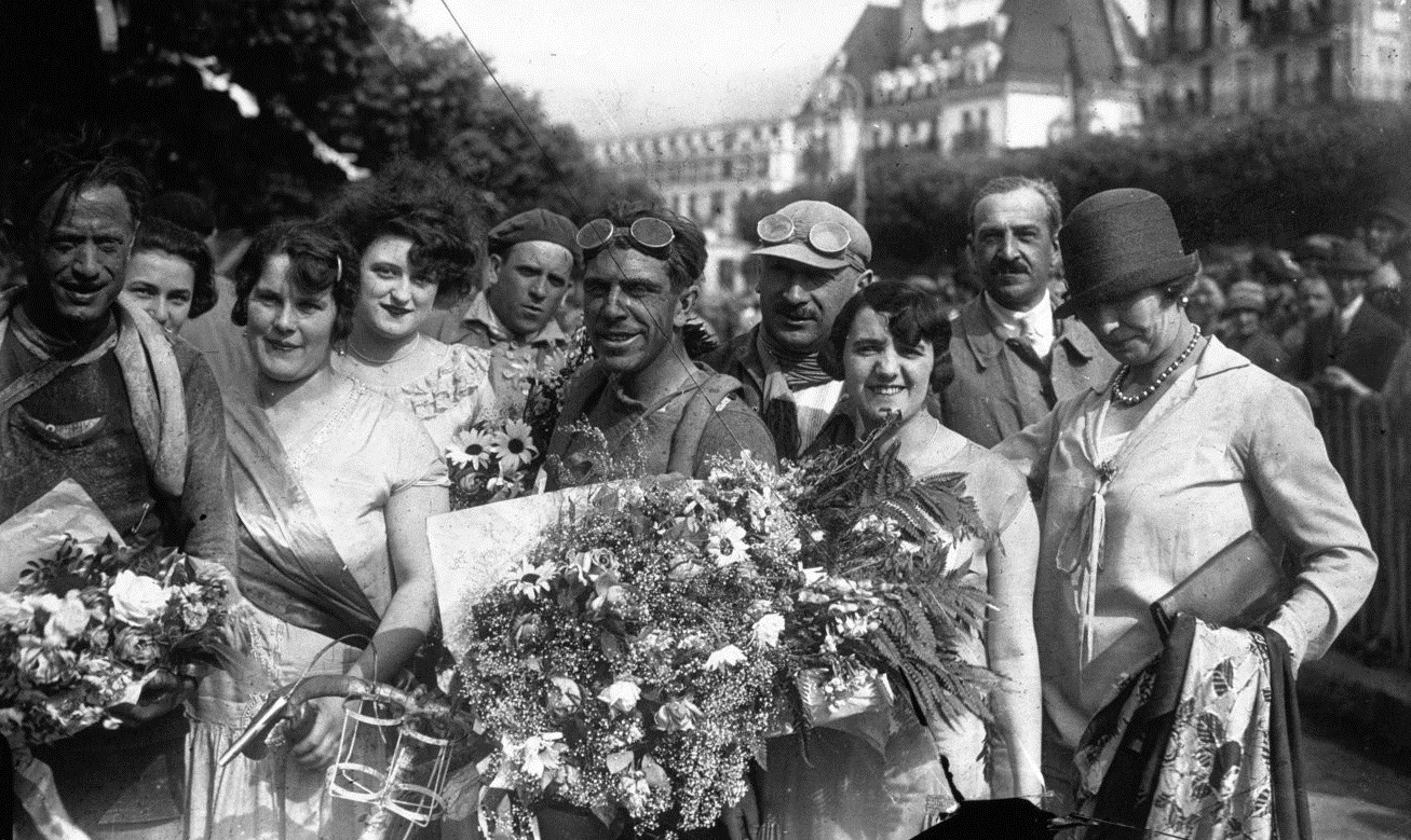 Tour de France 1926 : étape Briançon-Evian après l'arrivée Van Dam fleuri